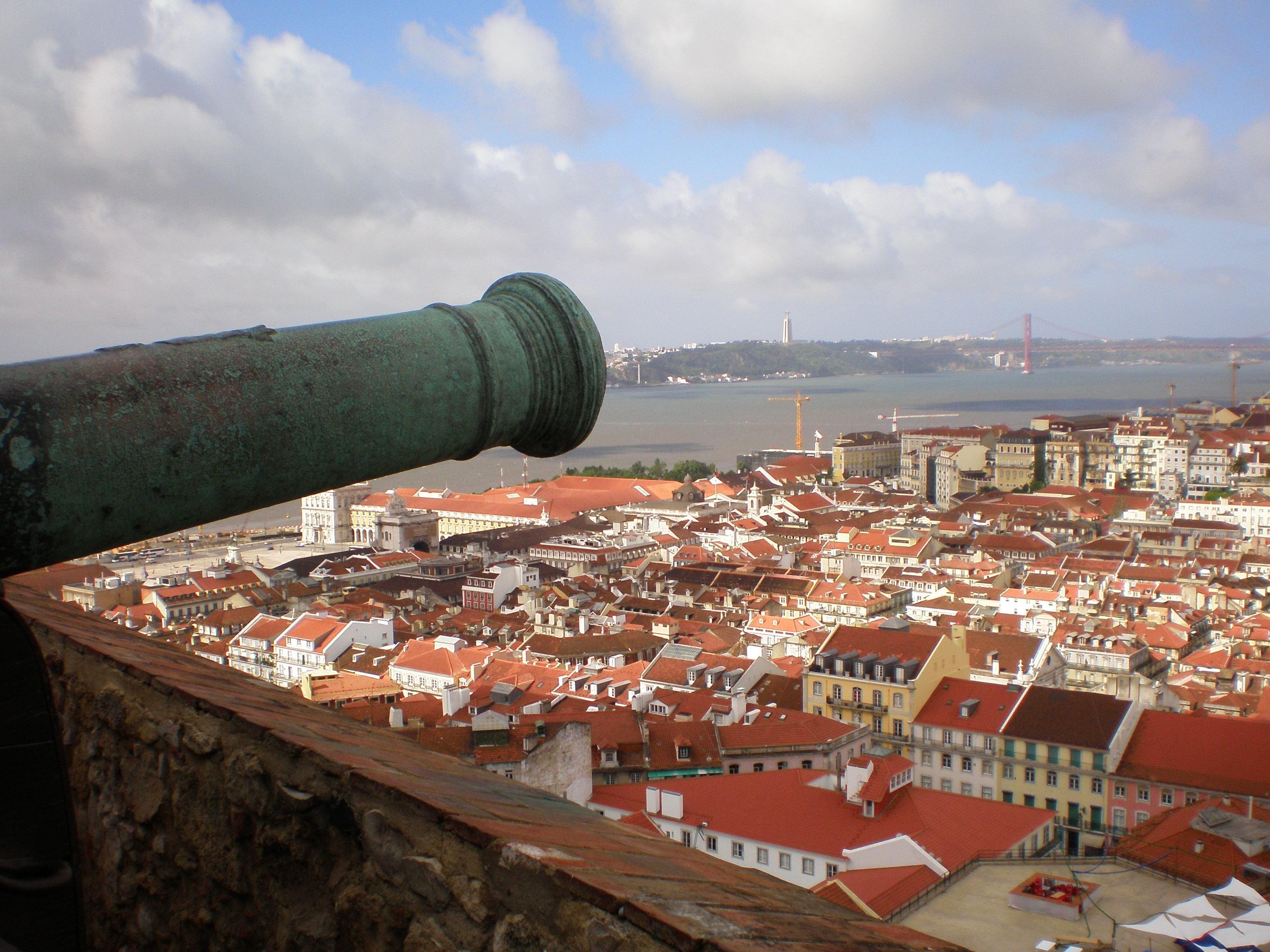 Vista desde el Castelo de Sâo Jorge